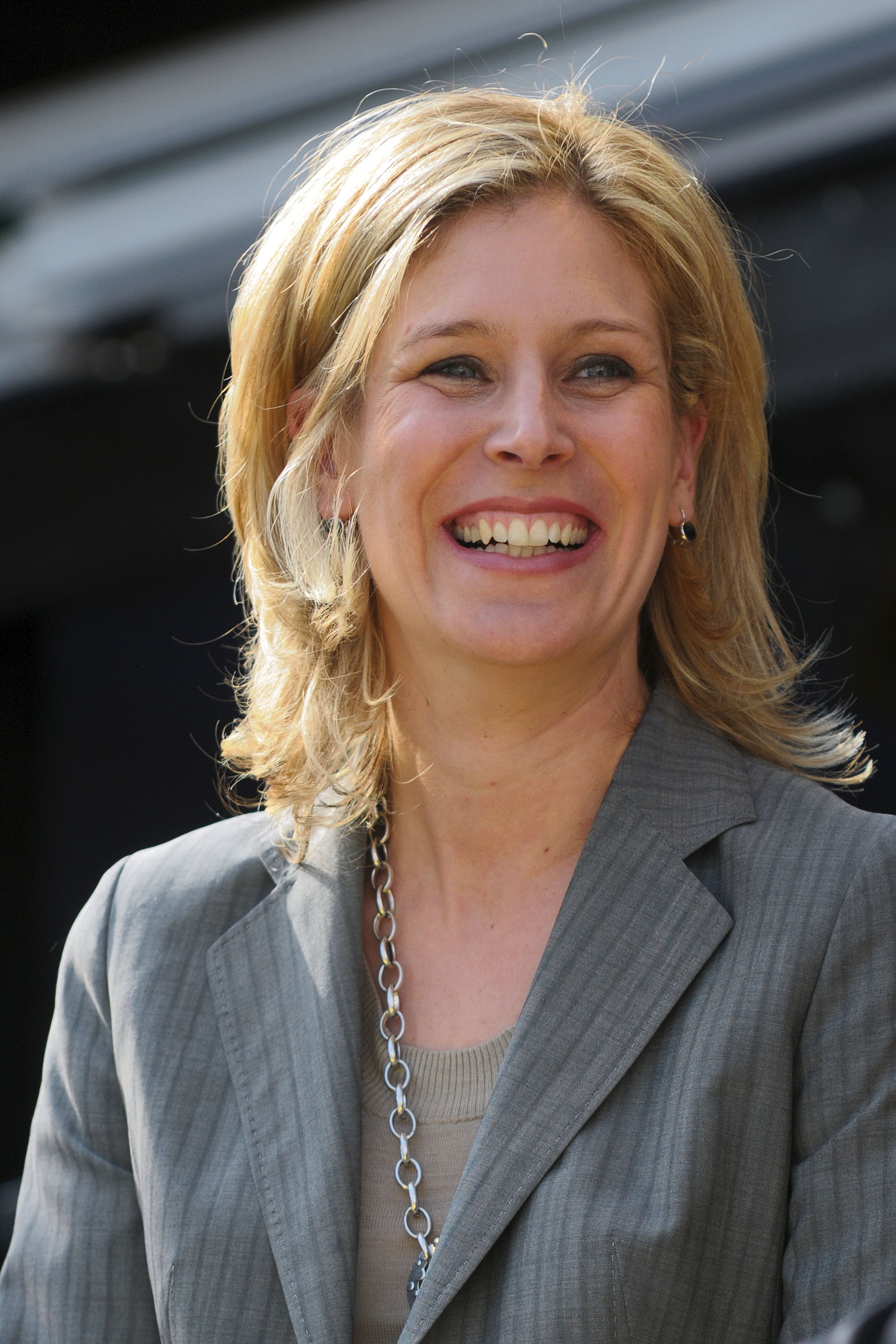 Silvana Koch-Mehrin bei einer Wahlkampfveranstaltung in Rostock